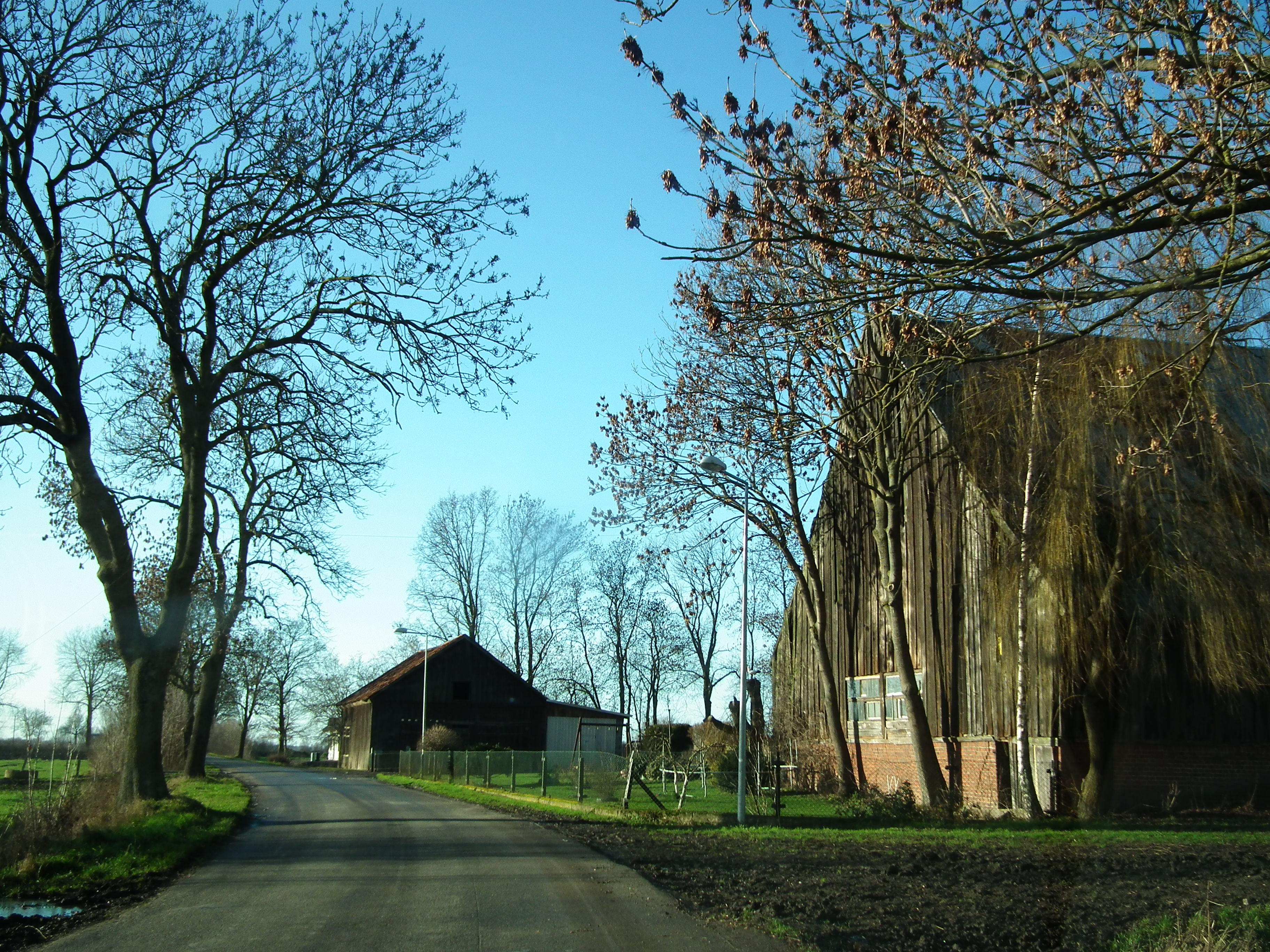 Stogi koło Malborka - fragment wsi.